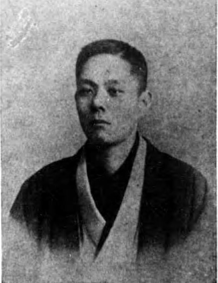 堀親篤(1863～1928)